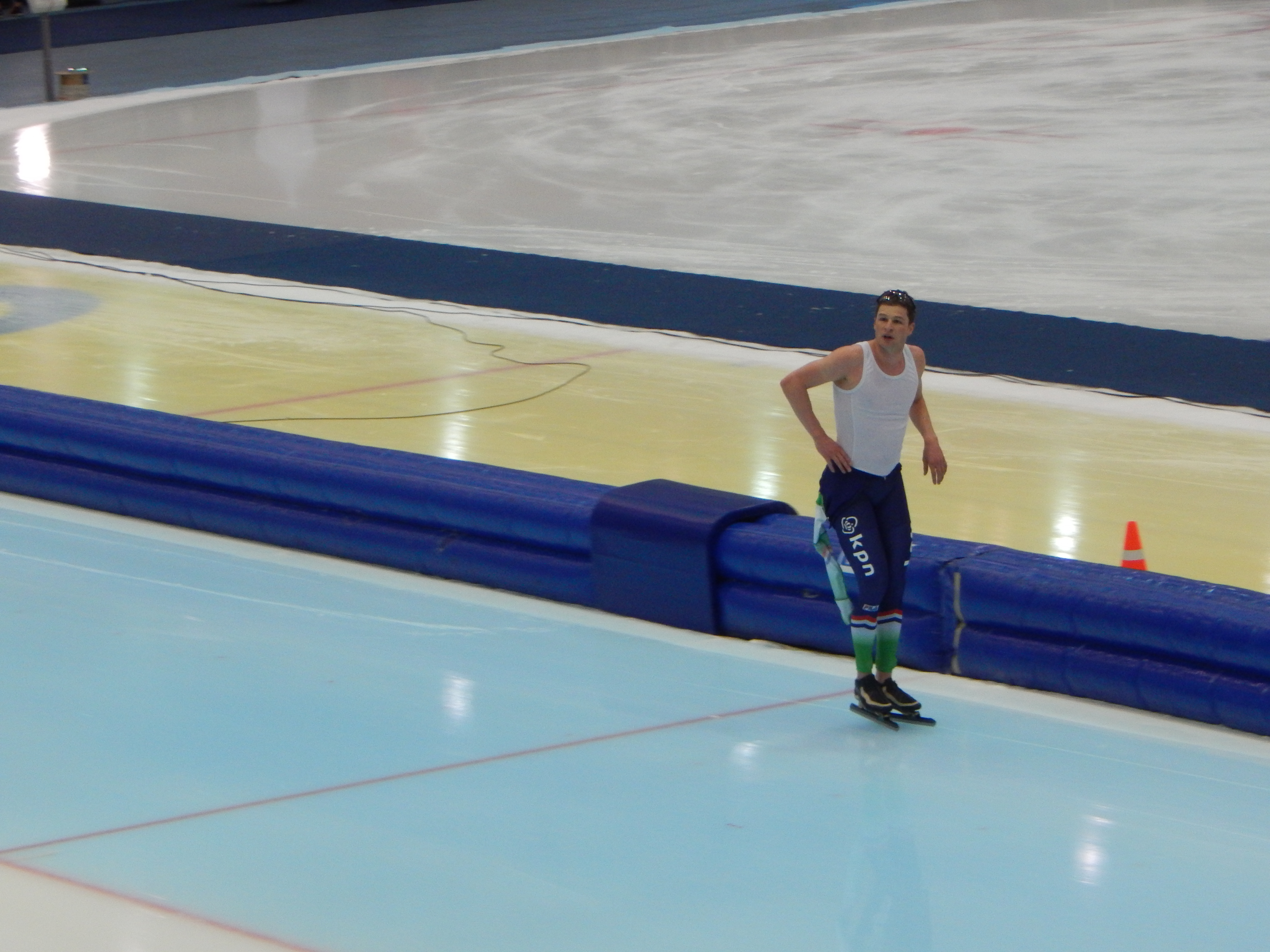 Чемпионат мира по конькобежному спорту 2016 в Коломне. Свен Крамер выигрывает забег на 10000 метров у мужчин